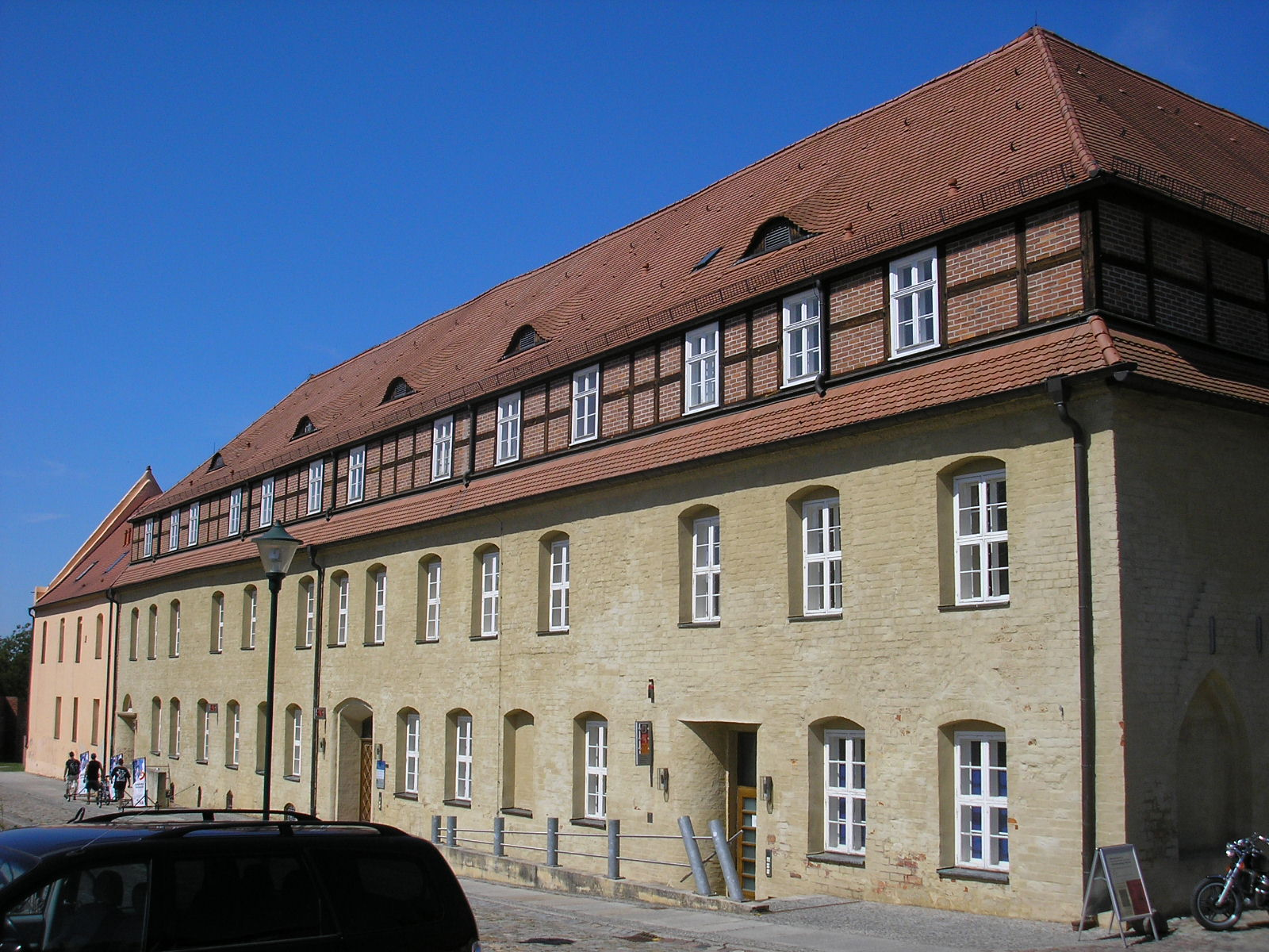 Gebäude des Dominikanerklosters in Prenzlau (Brandenburg).